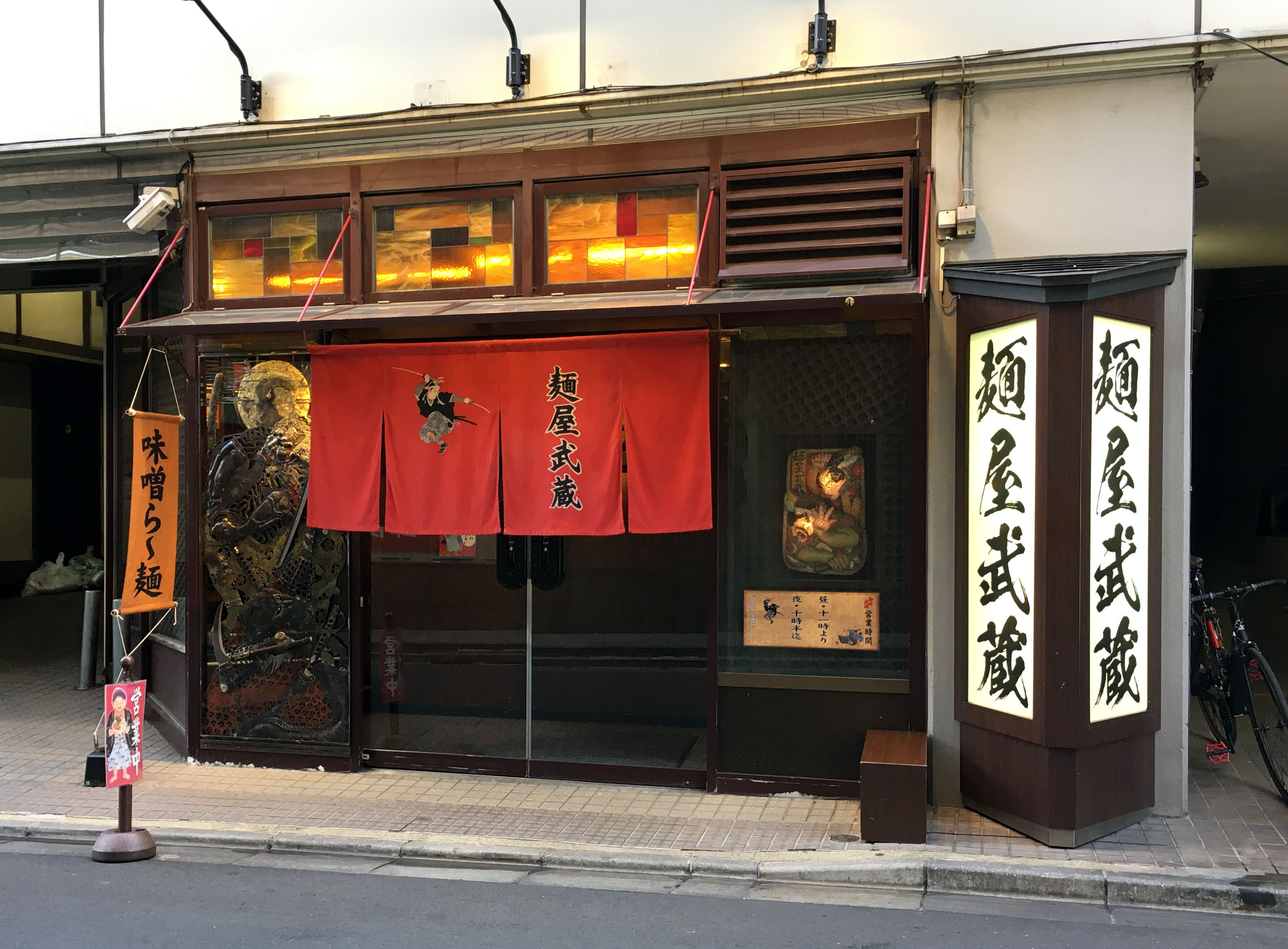 麺屋武蔵 新宿総本店